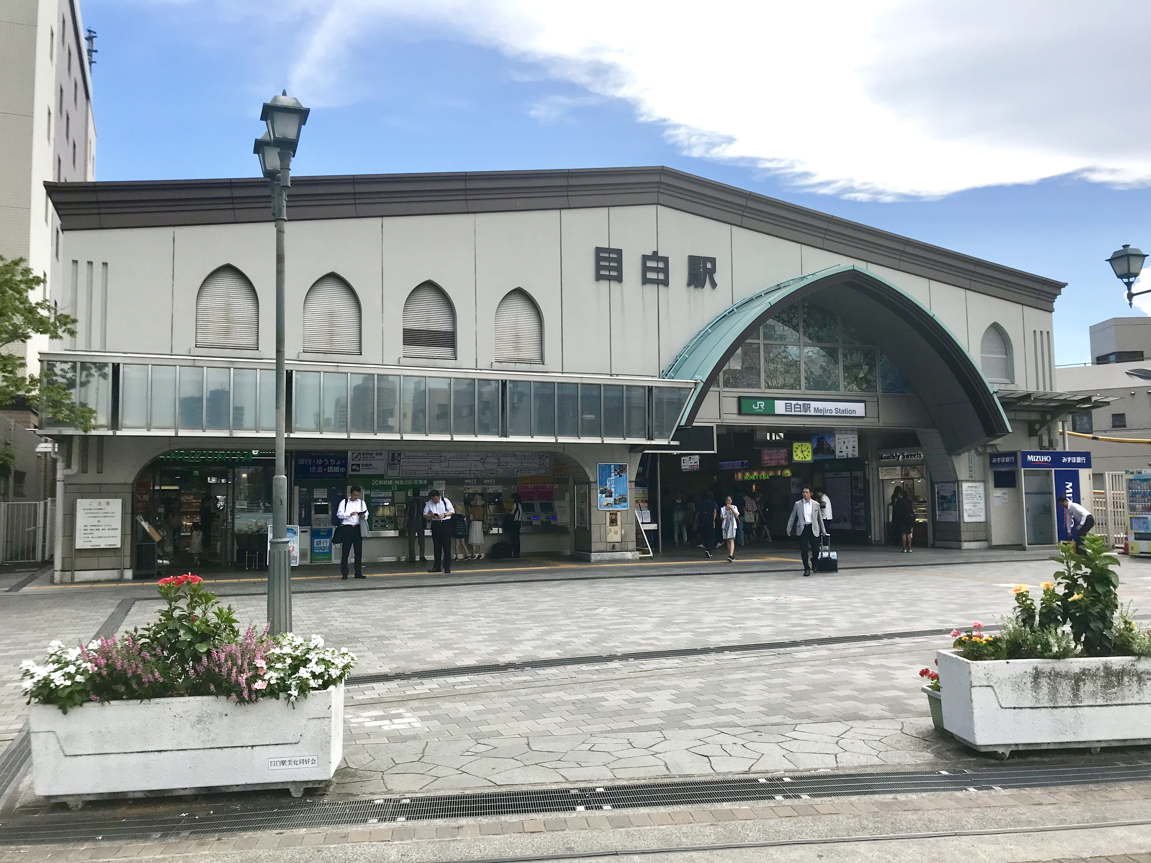 JR東日本山手線目白駅駅舎